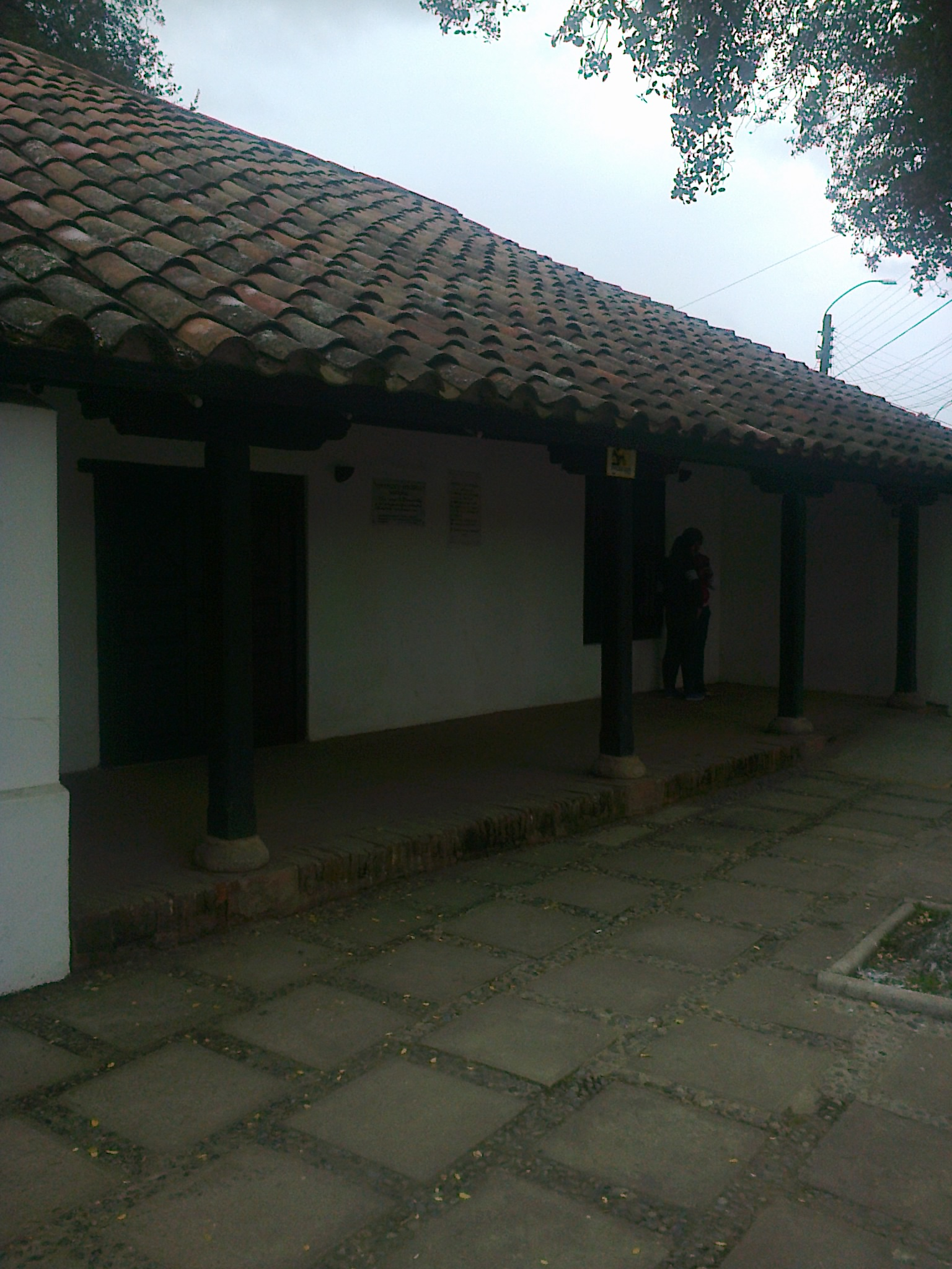 Museo Histórico de Yerbas Buenas This is a photo of a national monument in Chile: 395